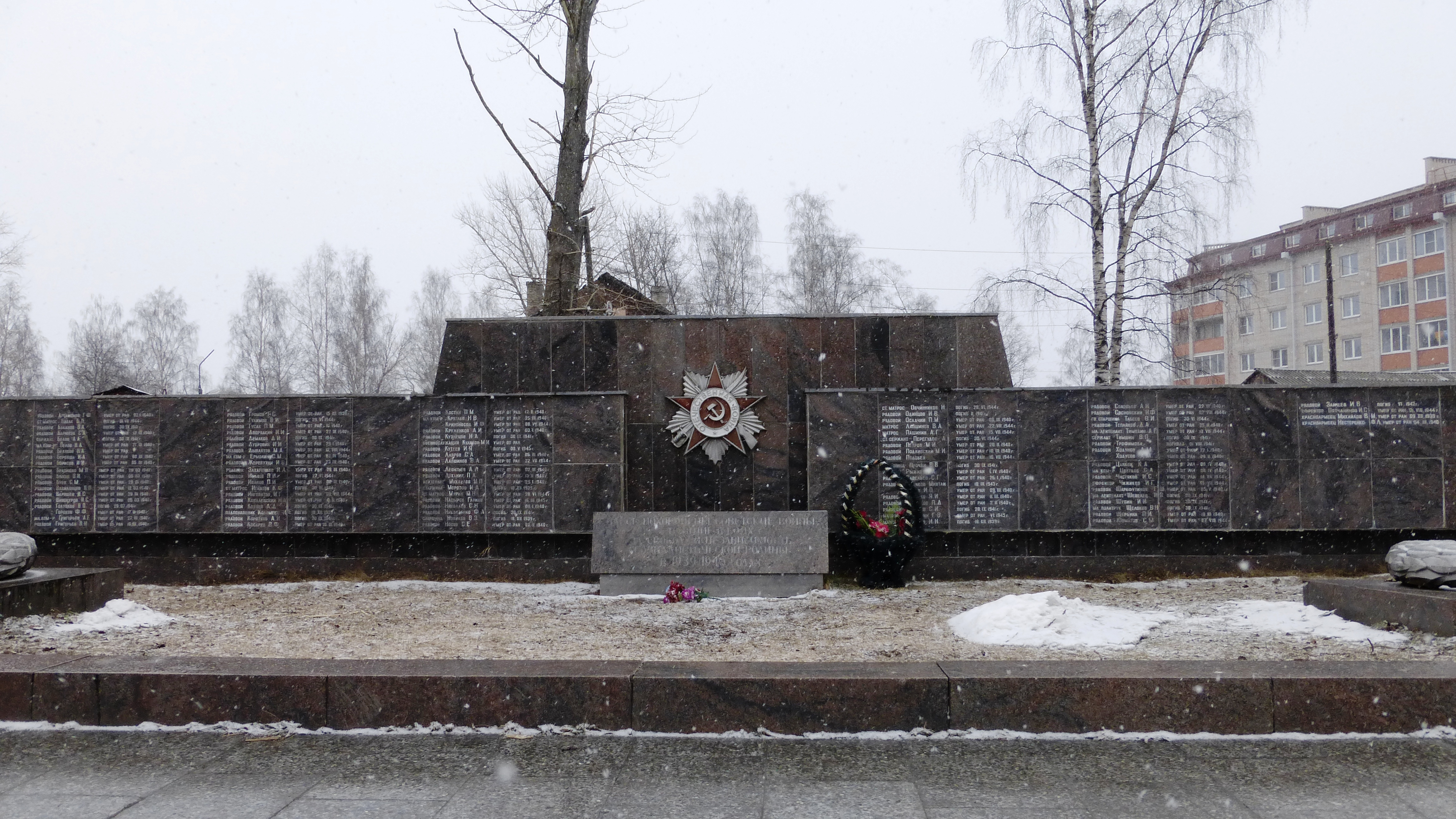 Мемориал «Братская могила советских воинов, погибших в 1939—1940 и 1941—1945 годах» на Зарецком кладбище в Петрозаводске. Установлен в 1984 году, автор проекта памятника — художник Г. В. Иванов.